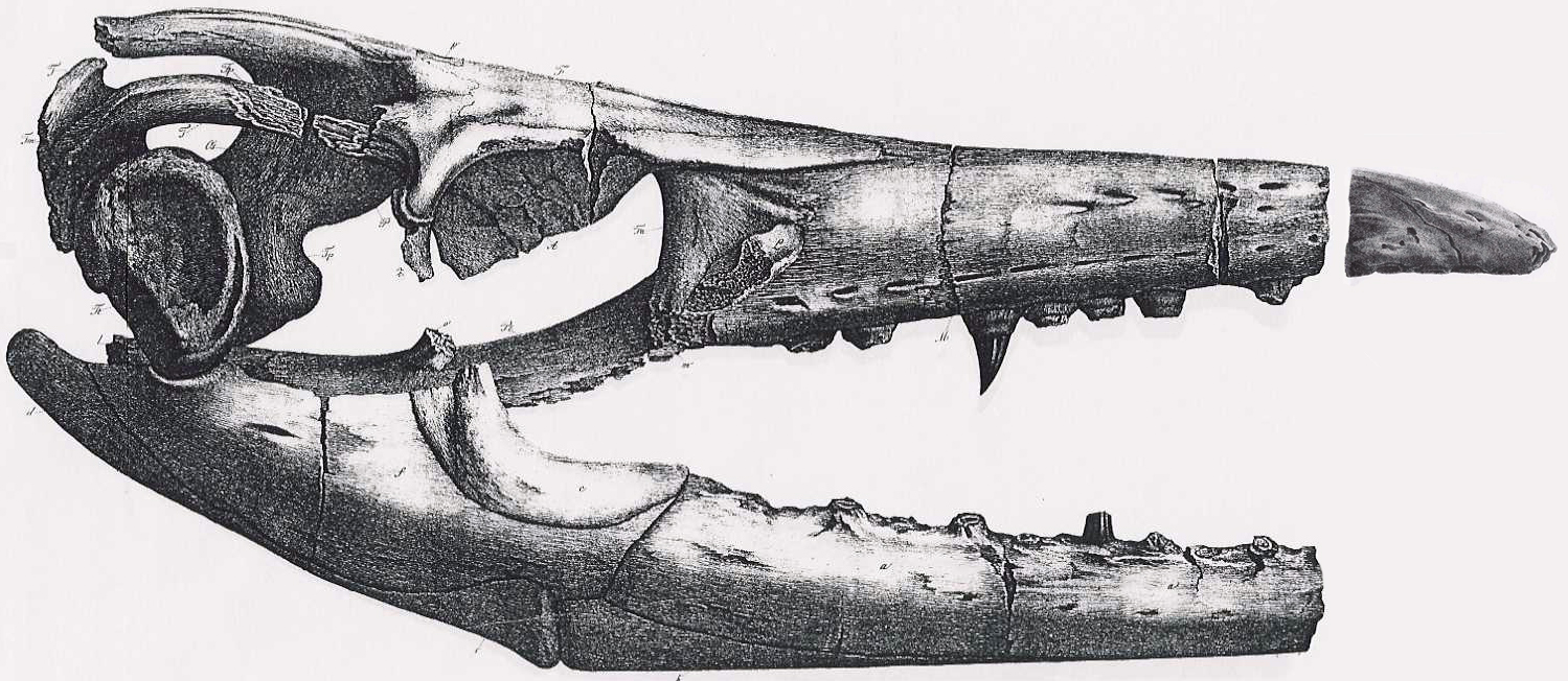 Ichthyosaurus missouriensis and Mosasaurus maximiliani combined as Mosasaurus missouriensis.